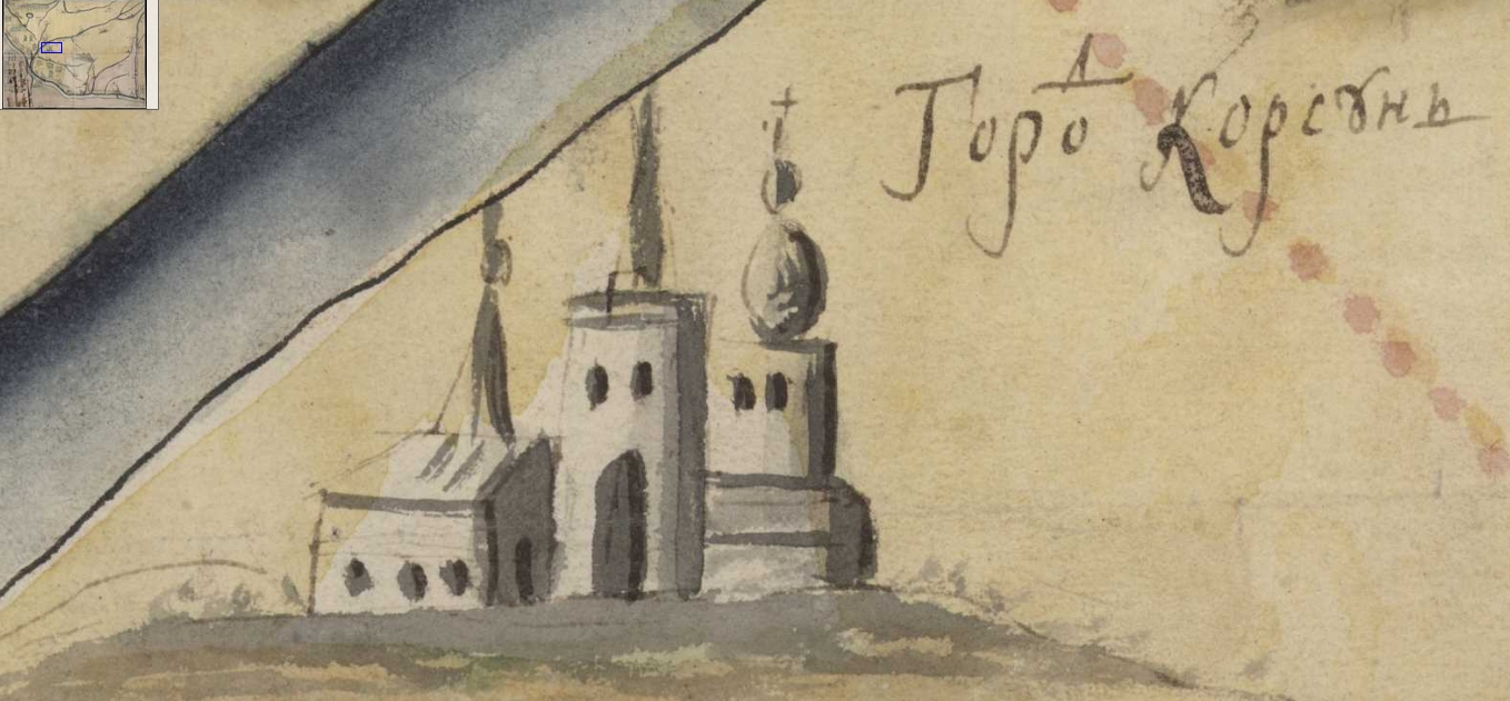 Фрагмент карти Київської губернії. XVIII століття. РГАДА, ф. 192, оп. 1, Киевская губ., № 5.